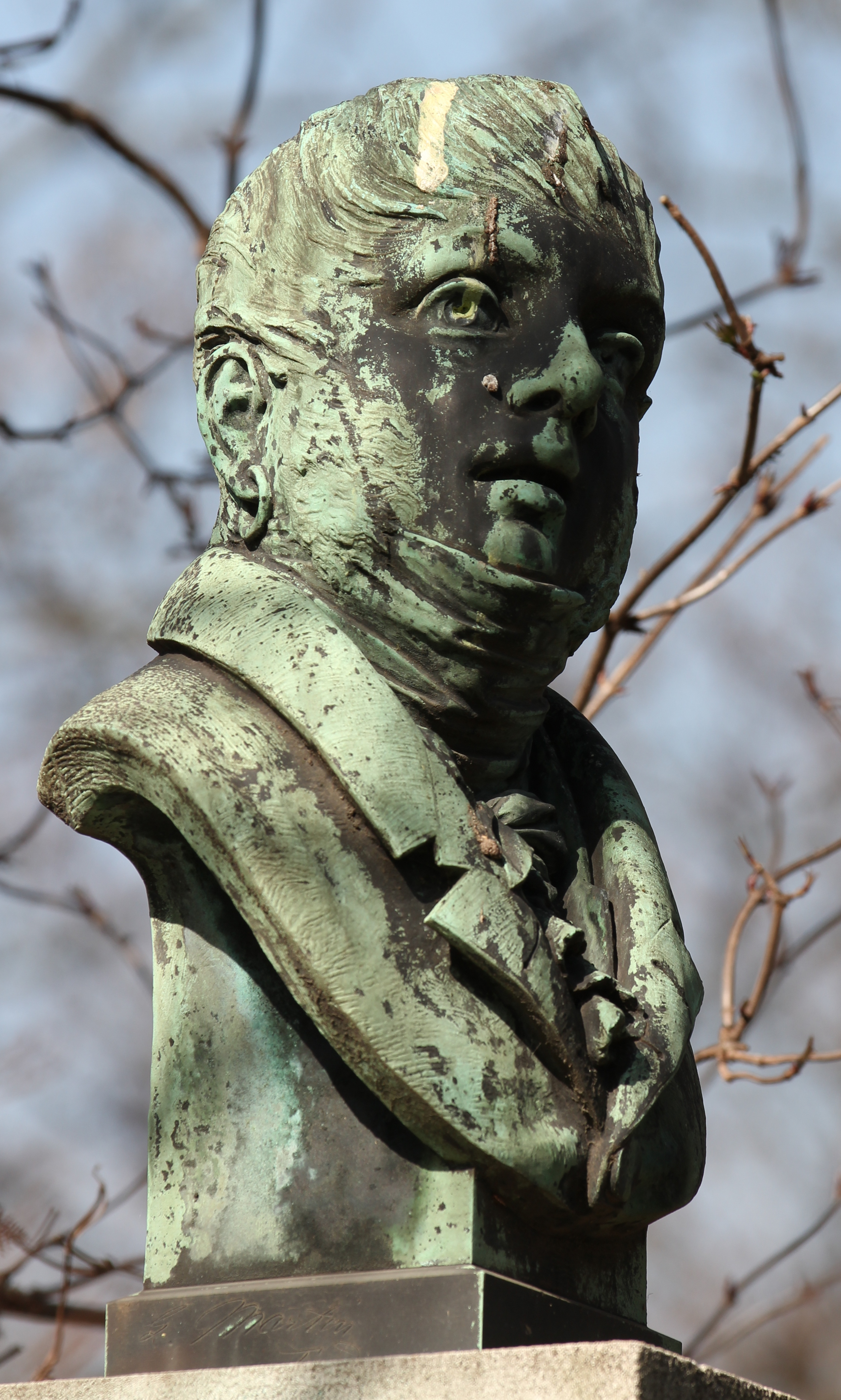 Sépulture de Pierre-Jean Garat (1762-1823), musicien et chanteur baryton français. Stèle ornée sur la face antérieure d'un bas-relief en marbre représentant l'allégorie de la musique. Un buste en bronze repose sur la stèle. buste